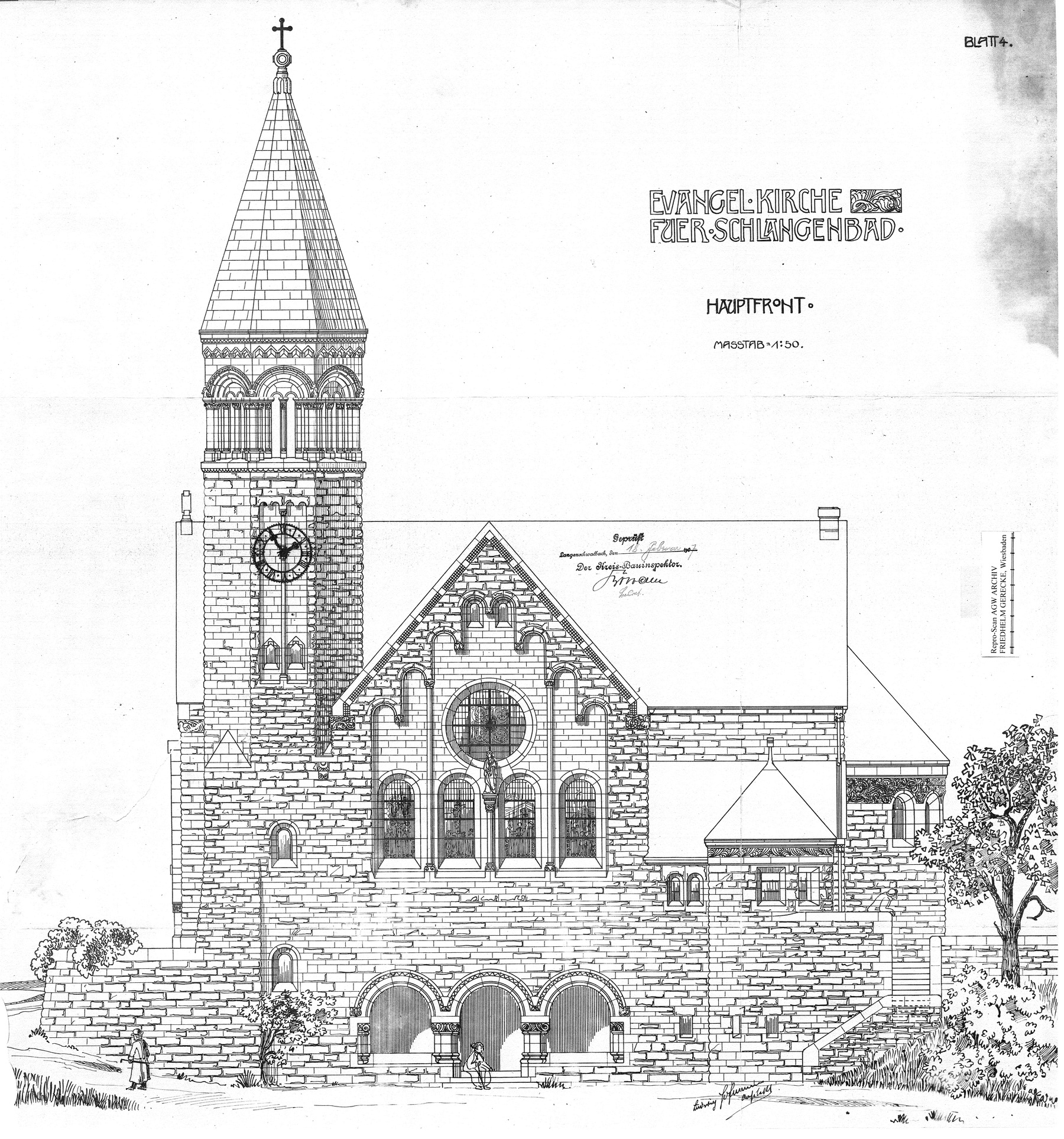 Hauptfront